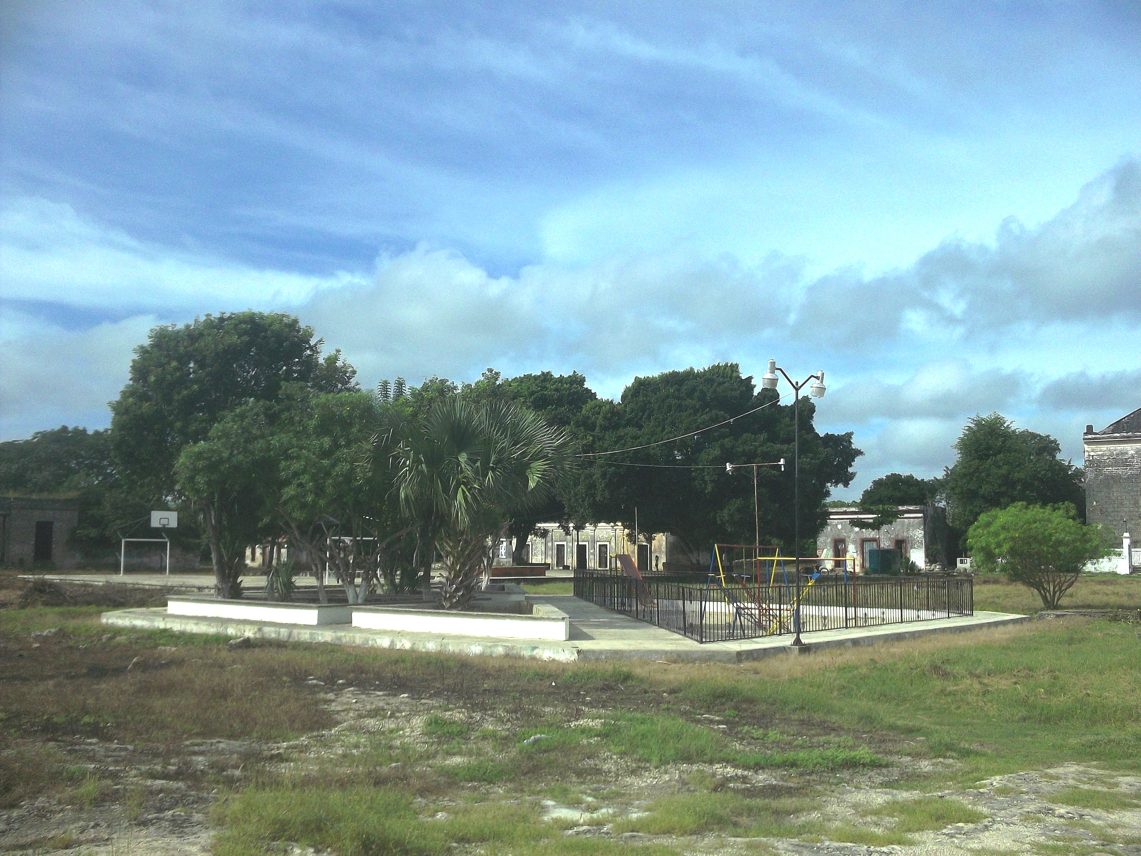 Parque principal de Cacao (Abalá), Yucatán.